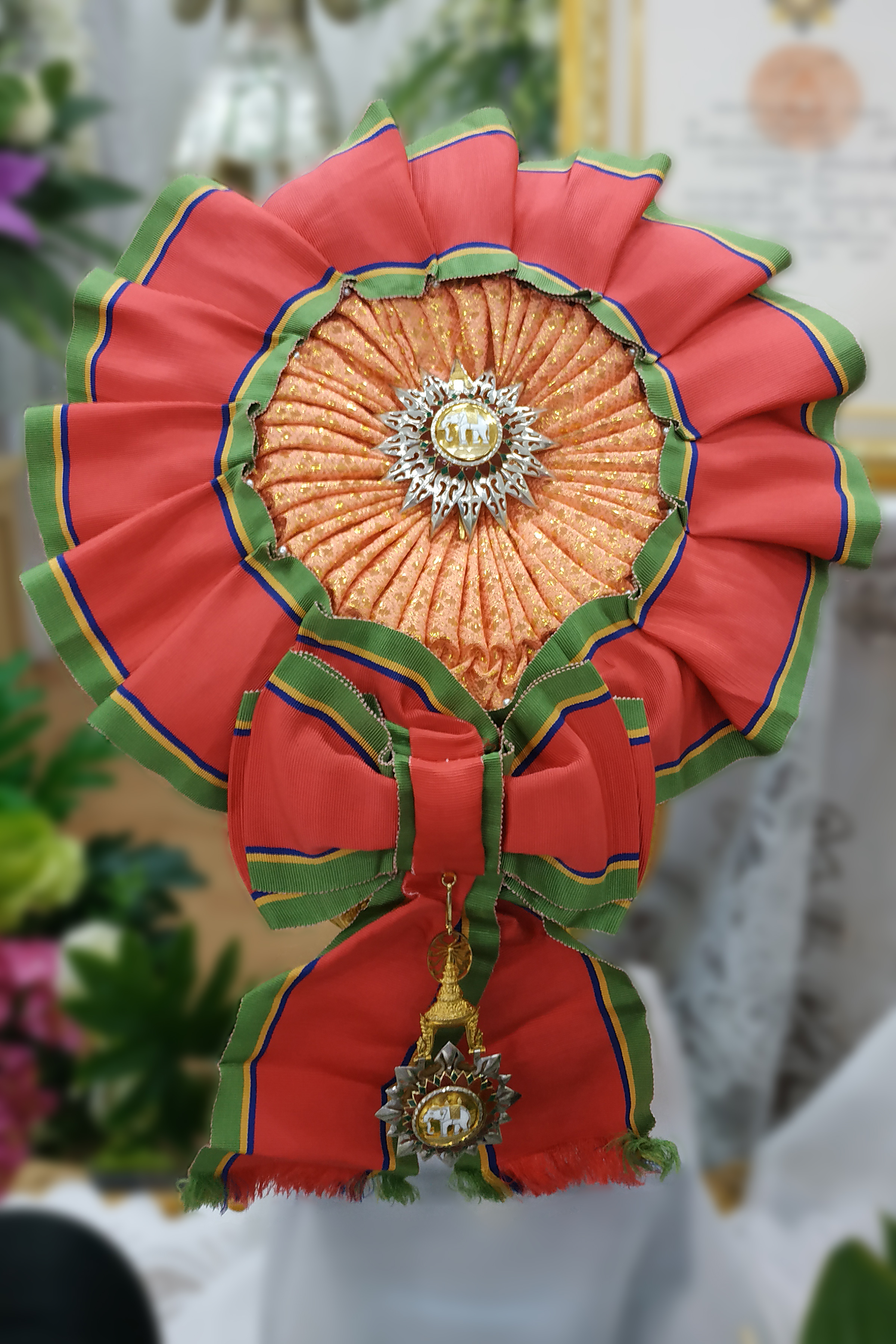 สายสะพาย ดวงตรา และดารา เครื่องราชอิสริยาภรณ์อันเป็นที่เชิดชูยิ่งช้างเผือก ชั้นที่ 1 ประถมาภรณ์ช้างเผือก